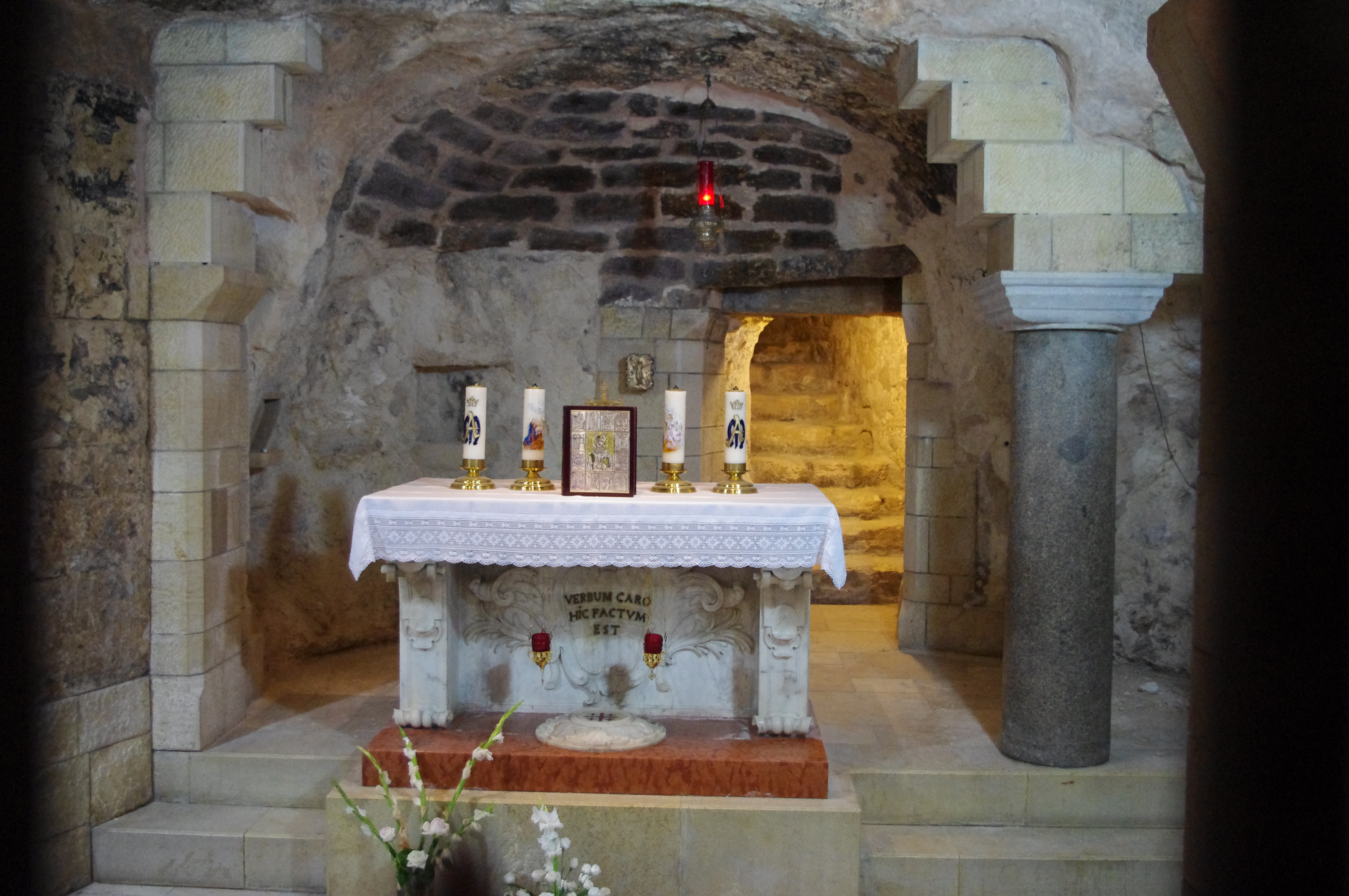 V kostole